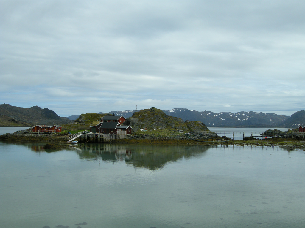 Trollholmen i Skipsfjorden